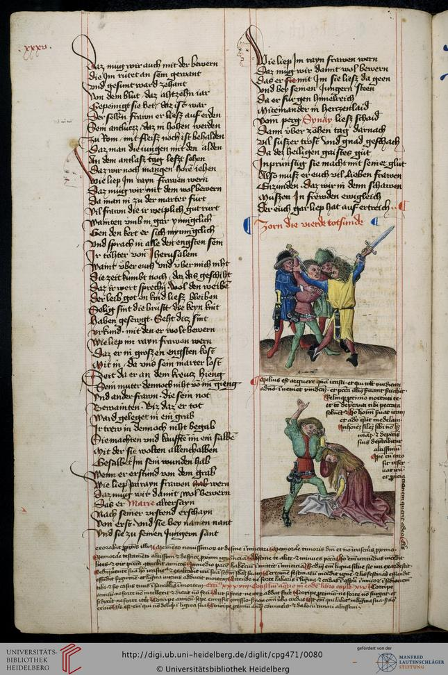 Hugo von Trimberg "Der Renner"